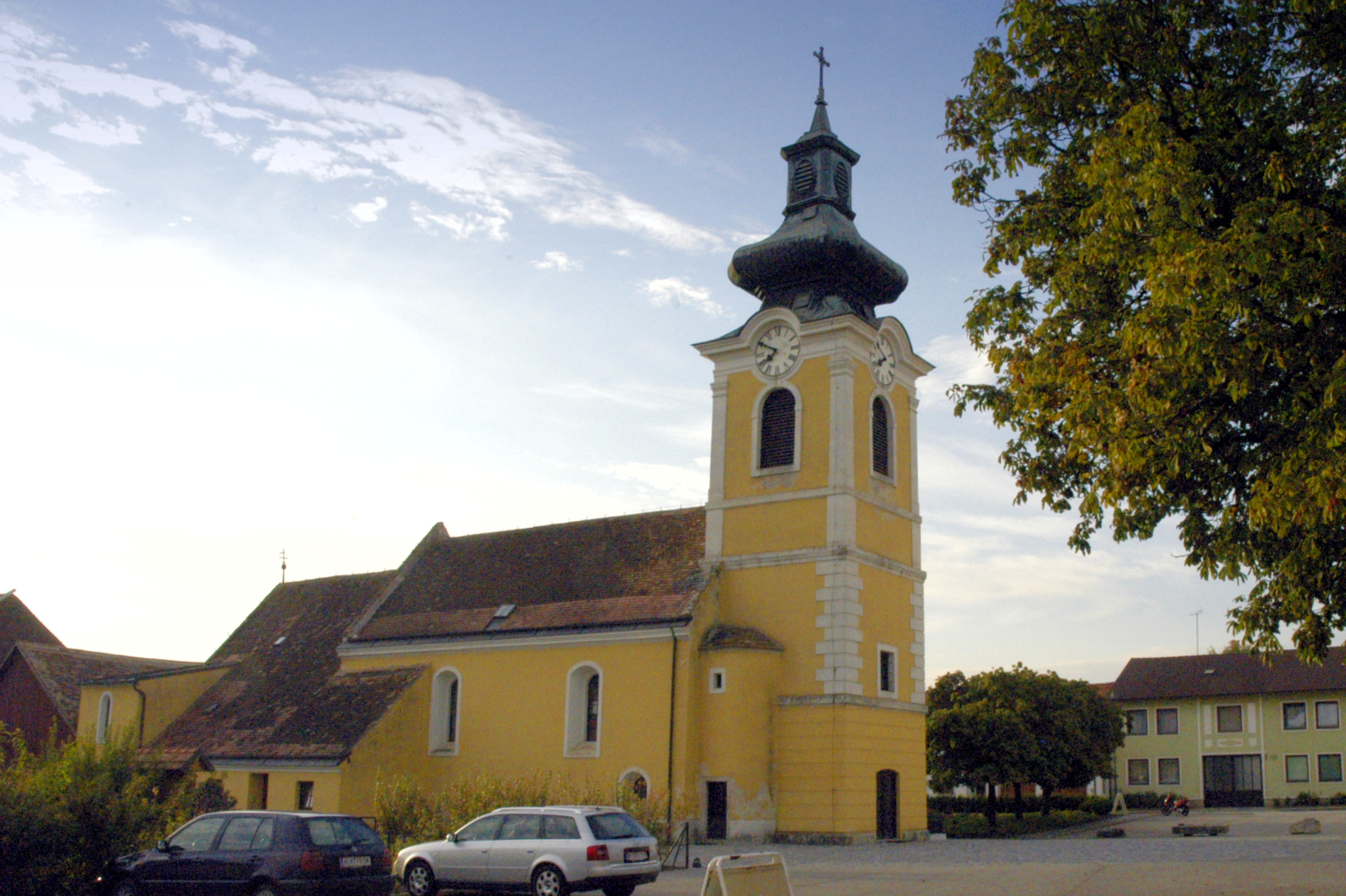 katholische Pfarrkirche heiliger Pankrazius in Großnondorf, Gemeinde Guntersdorf